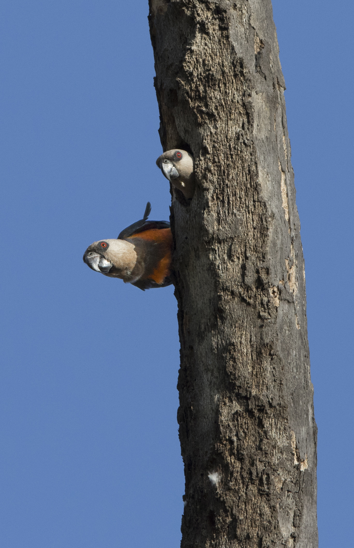 Двойка червенокоремни папагали. Резерват Самбуру, Кения